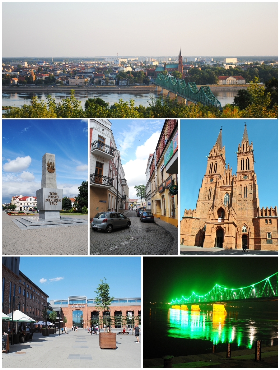 Kolaż z widokami Włocławka